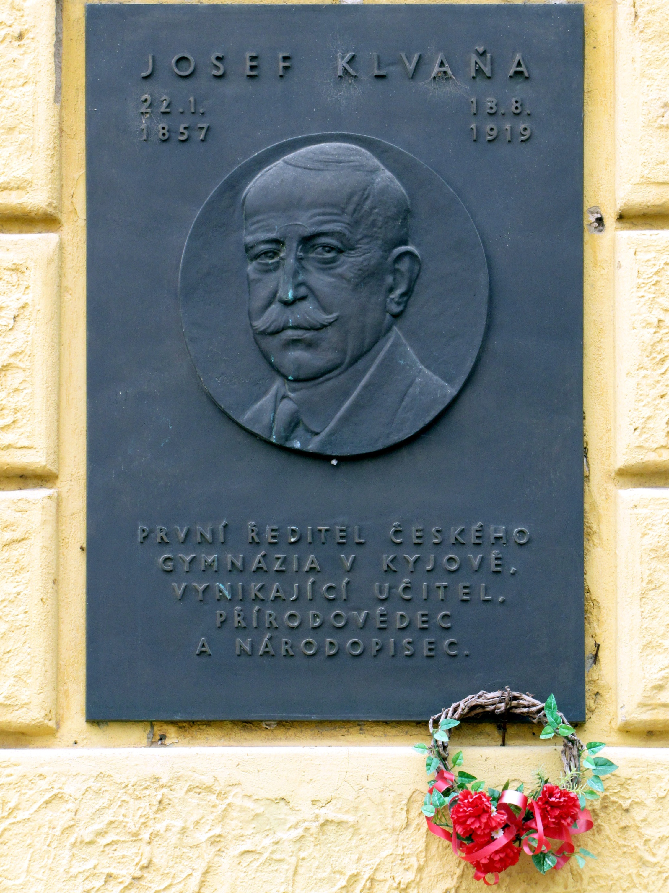 Josef Klvaňa - pamětní deska na budově kyjovského gymnázia. Autor desky - Václav Adolf Kovanič